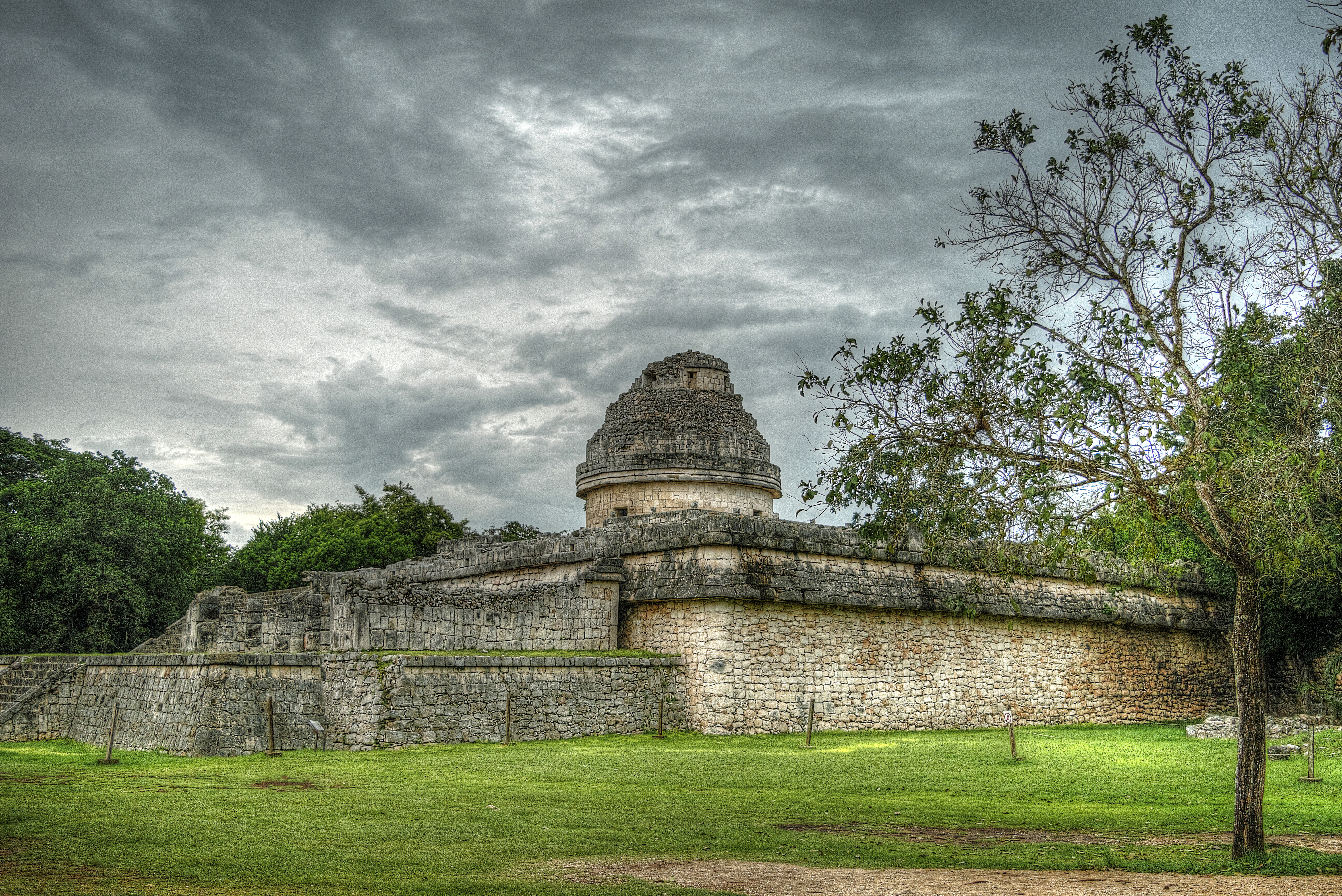 Imagen panorámica del "Caracol" en Chichén Itzá, Yucatán, México